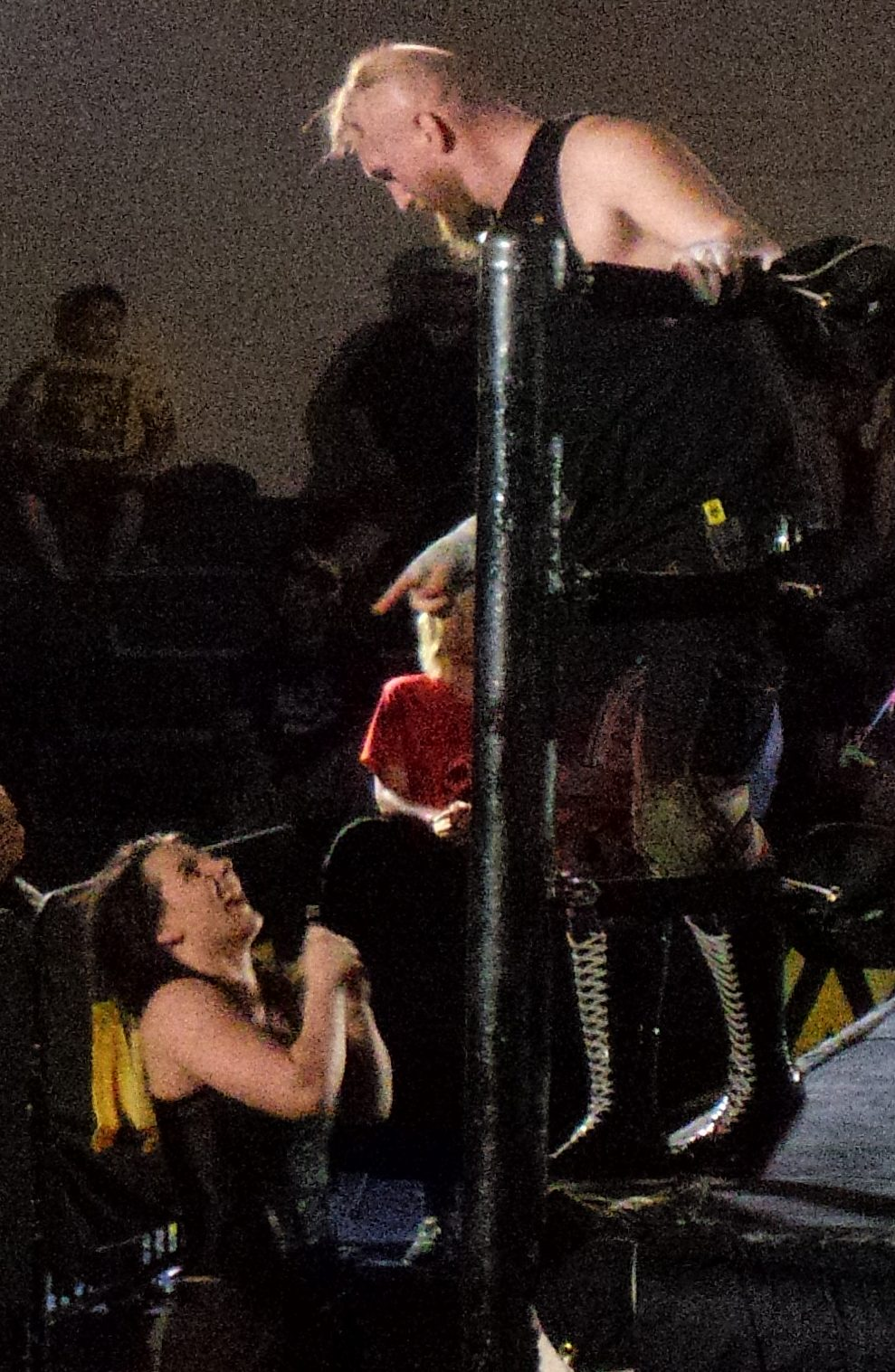 P_20170505_212447_003